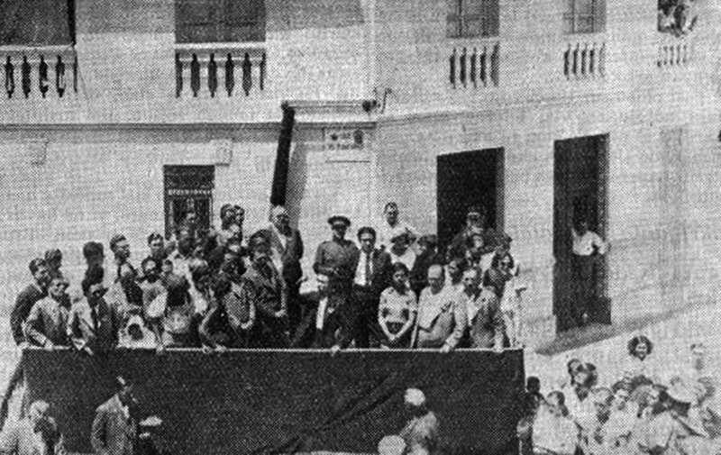 Inaŭguro de strata tabulo al LLZ dum la 14-a SAT-kongreso en Valencio. Parolas Luis Hernández Lahuerta.